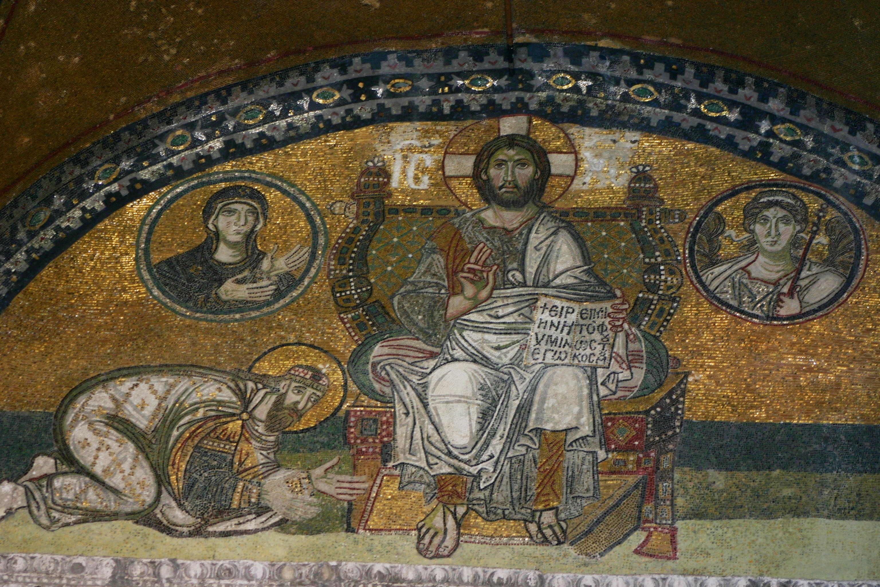 Mosaico do Portão Imperial em Hagia Sophia. Ajoelhado à direita do Cristo Pantocrator está o imperador bizantino Leão VI.